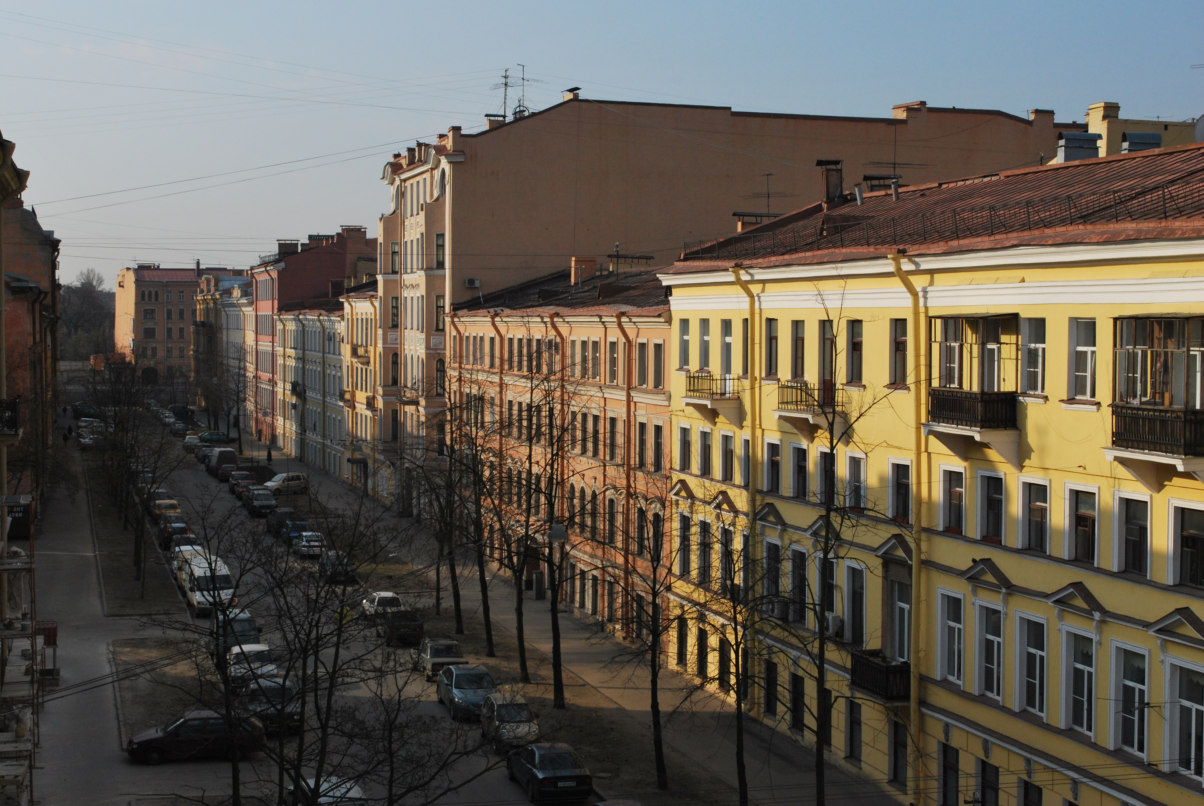 Pereulok Makarenko